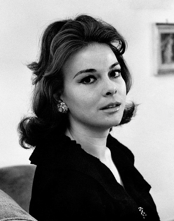 Gabriella Pallotta, Rome